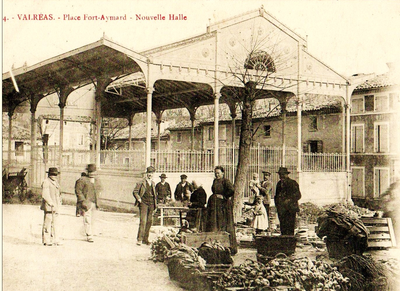 Nouvelles halles de Valréas construites en 1854